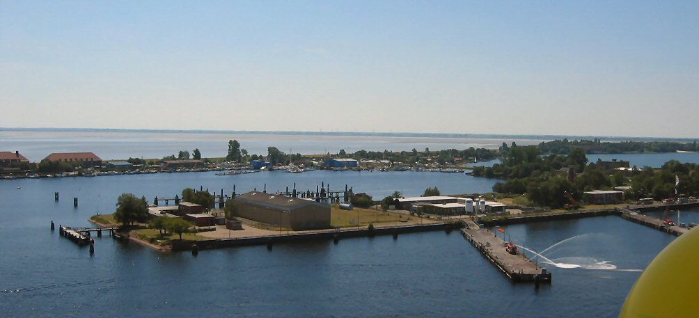 Blick vom Riesenrad über den Wilhelmshavener Binnenhafen; im Hintergrund der Jadebusen